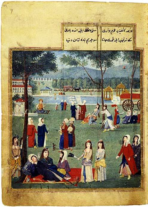 Vergnügungen an den Süßen Wasser Europas